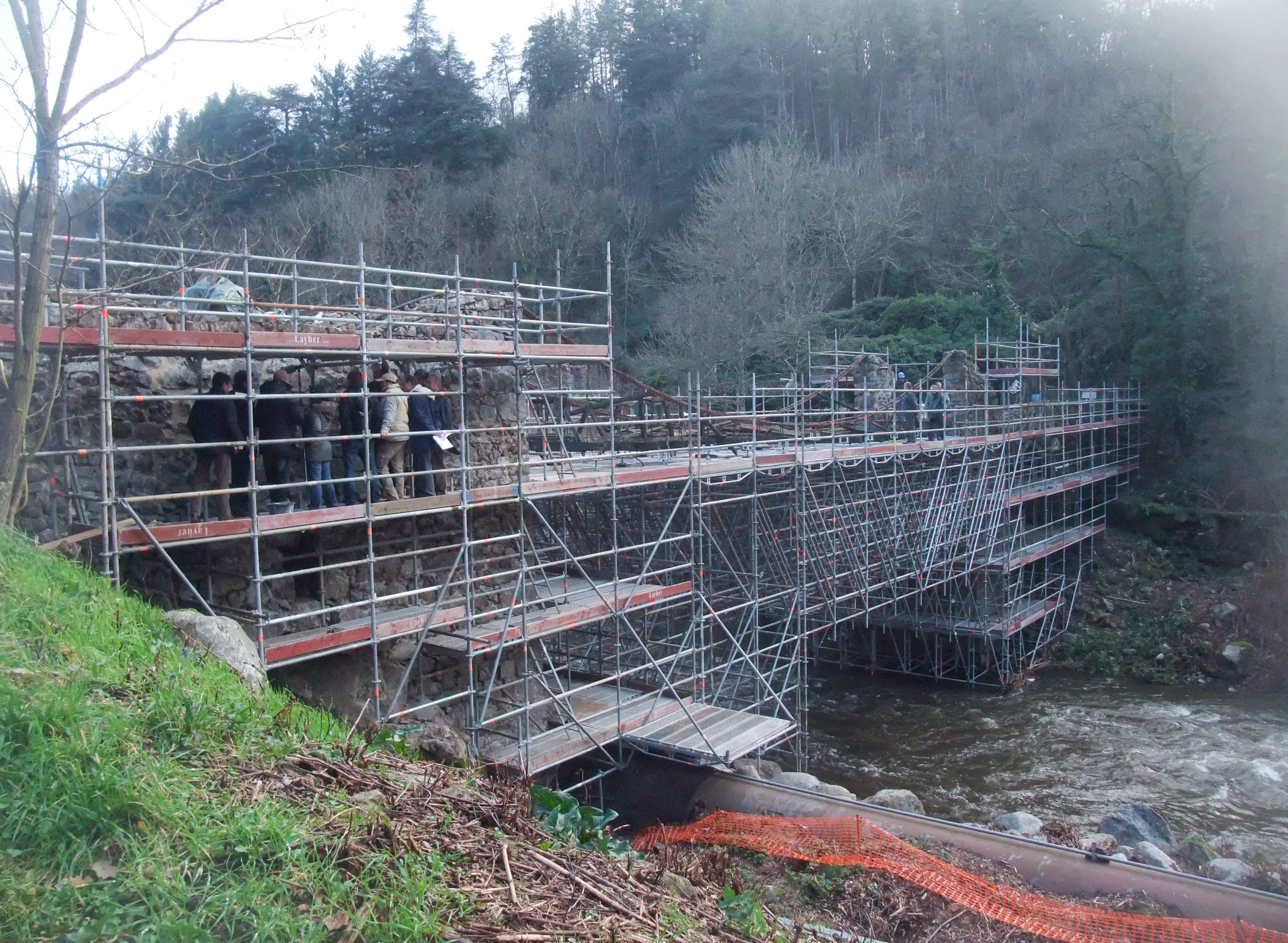 Pont de Moulin sur Cance échafaudage